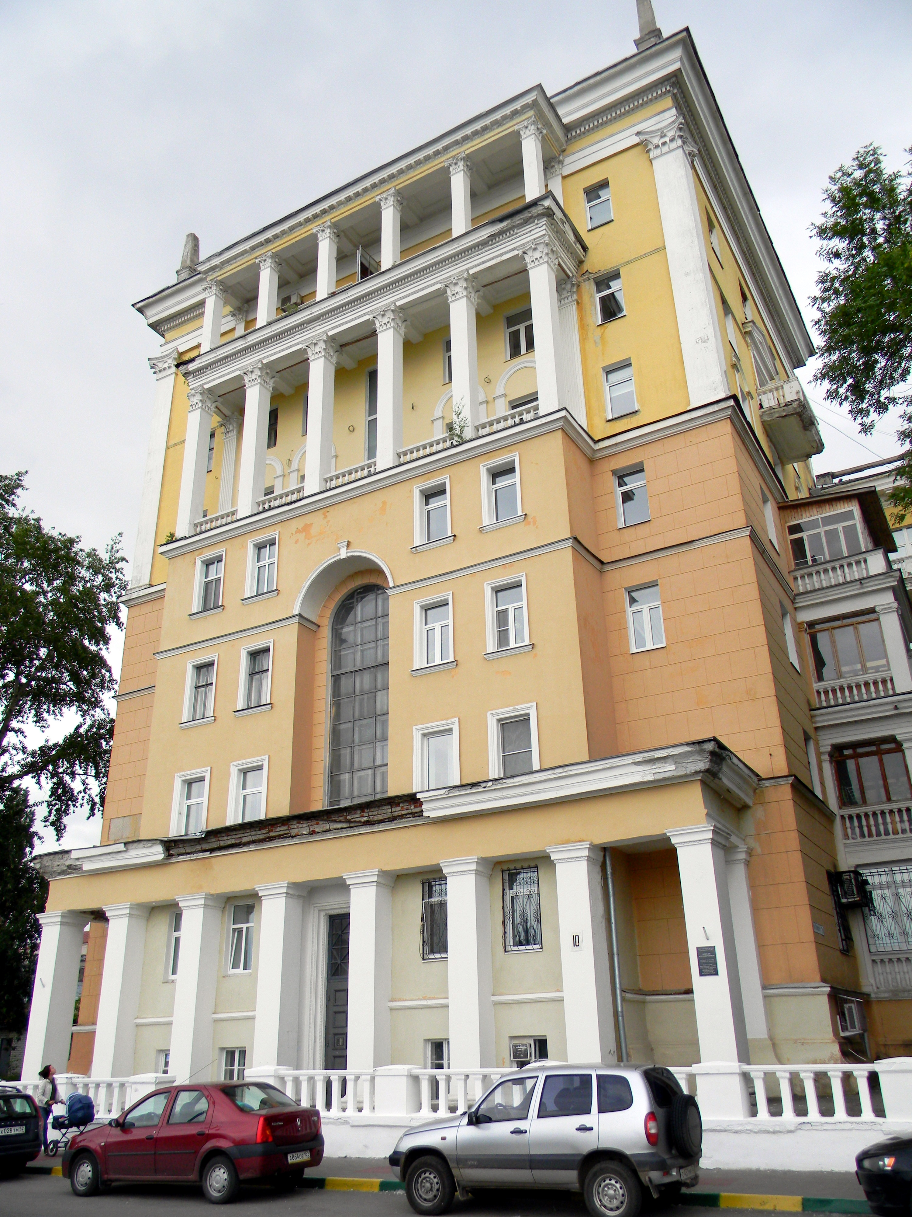 Дом железнодорожников на Верхне-Волжской набережной в Нижнем Новгороде. Адрес: Нижний Новгород, улица Семашко, 2